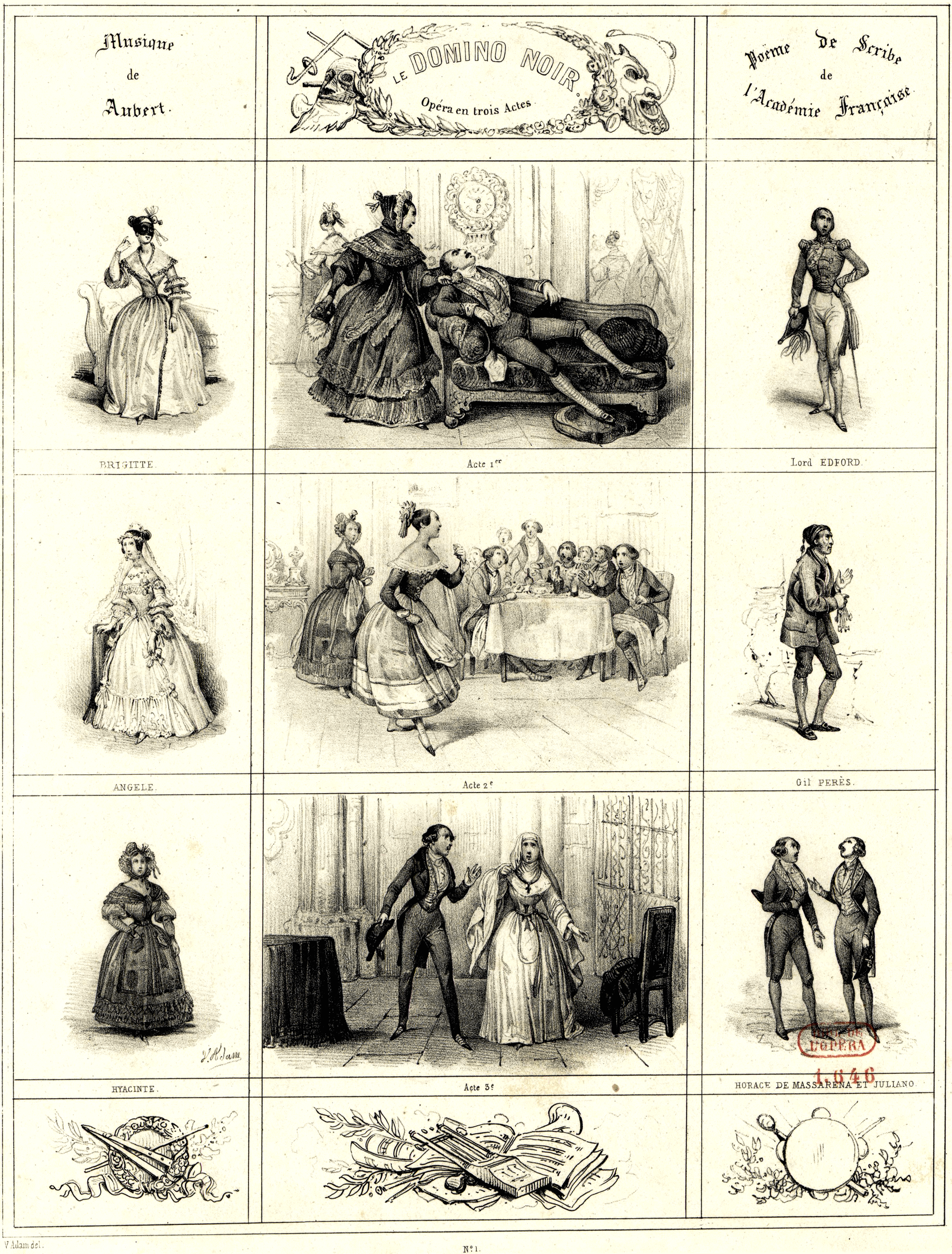 Lithograph of Le domino noir, an opéra comique in three acts by the French composer Daniel Auber, first performed by the Opéra-Comique at the Salle de la Bourse in Paris on 12 February 1837. The libretto is by Eugène Scribe.